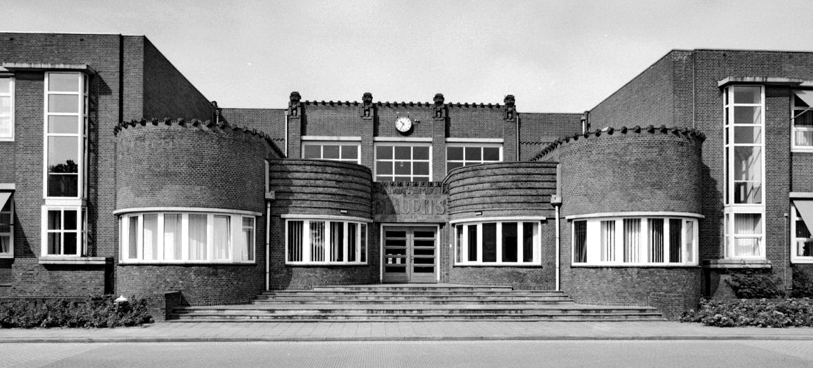 Voormalige Staatsmijn Maurits: Voorgevel hoofdkantoor, overzicht ingangspartij (opmerking: Gefotografeerd voor Monumenten In Nederland Limburg)